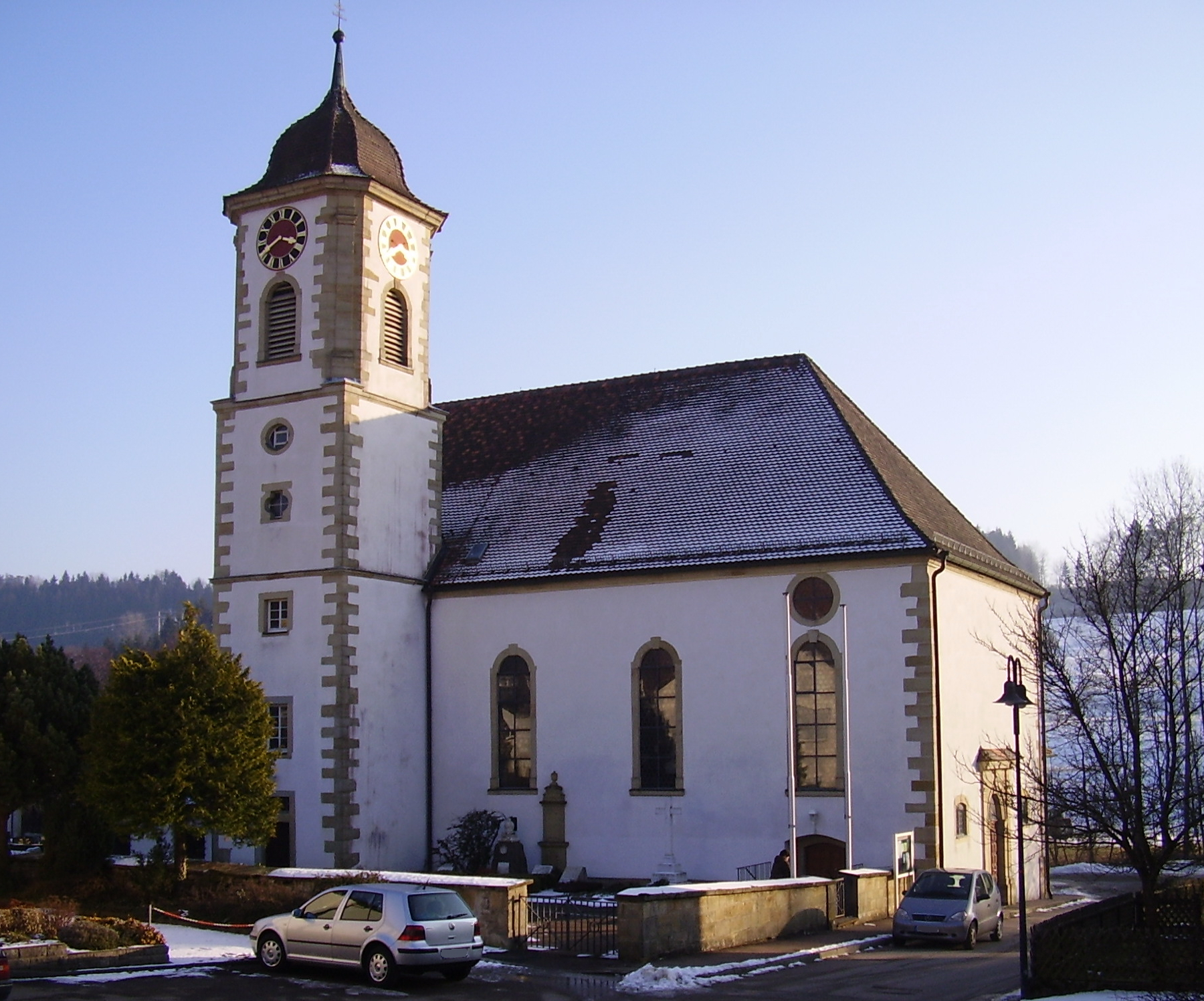 Die St. Georg Kirche in 73575 Leinzell.